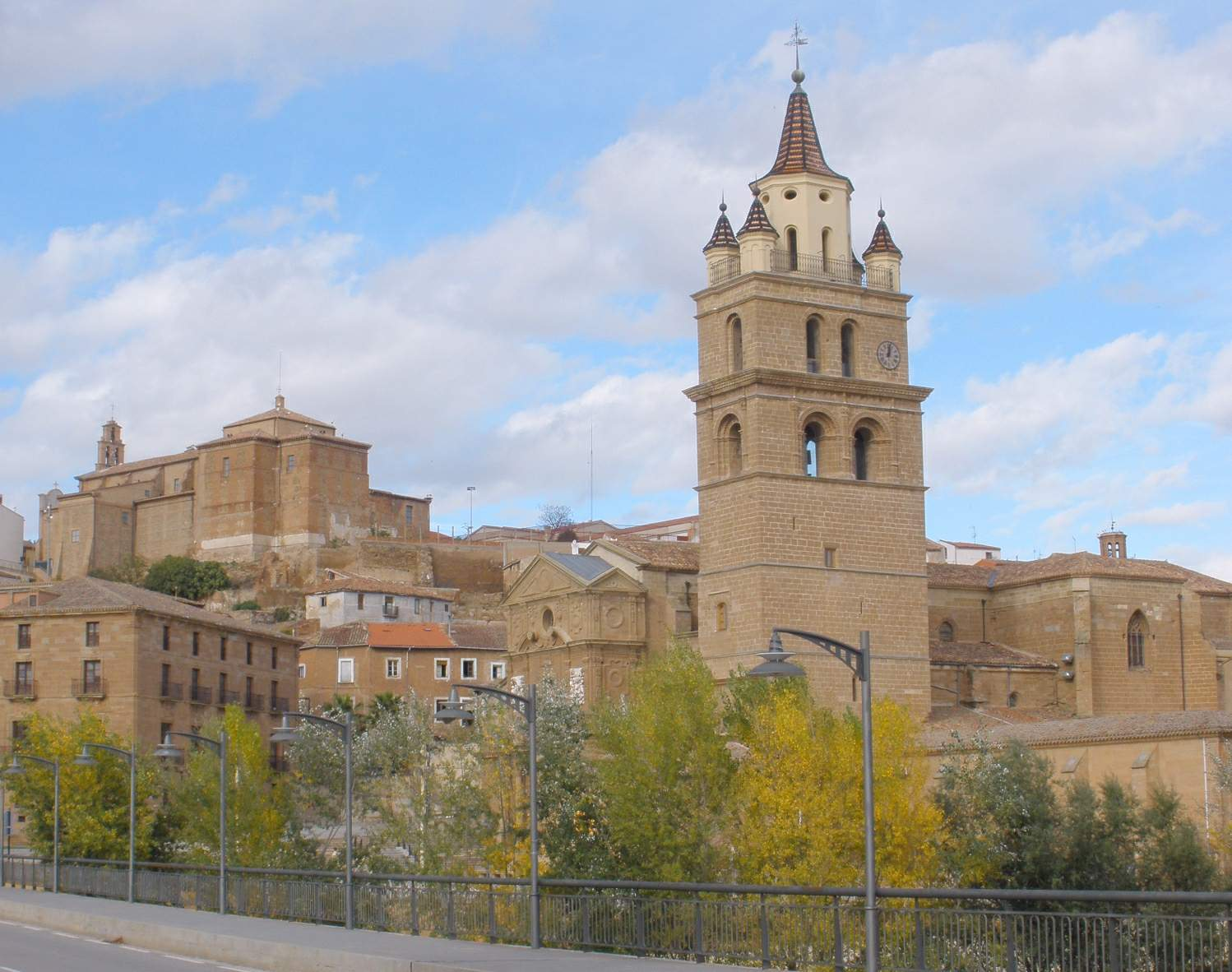 Catedral de Calahorra (La Rioja)